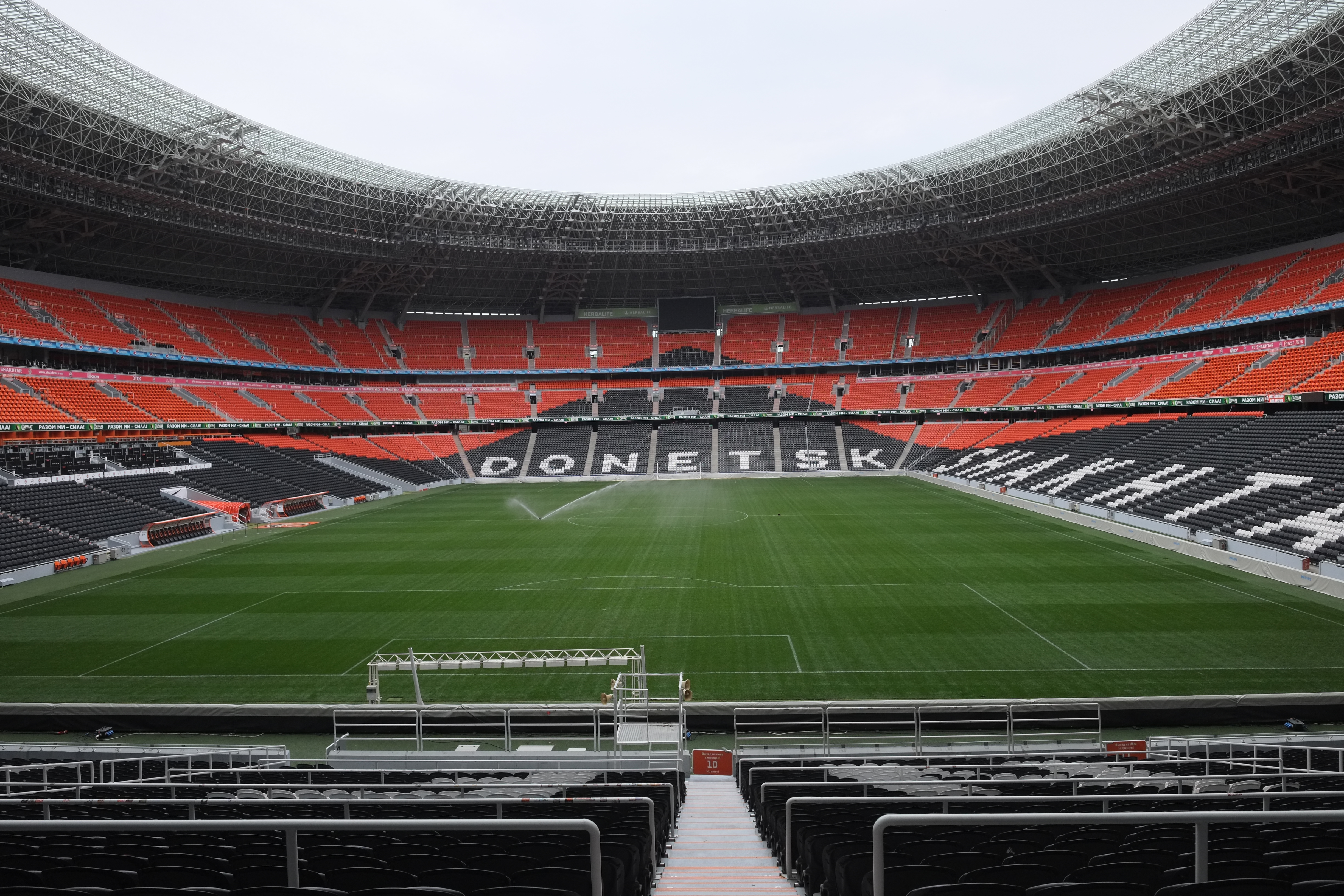 DrupalCamp Donetsk 2014